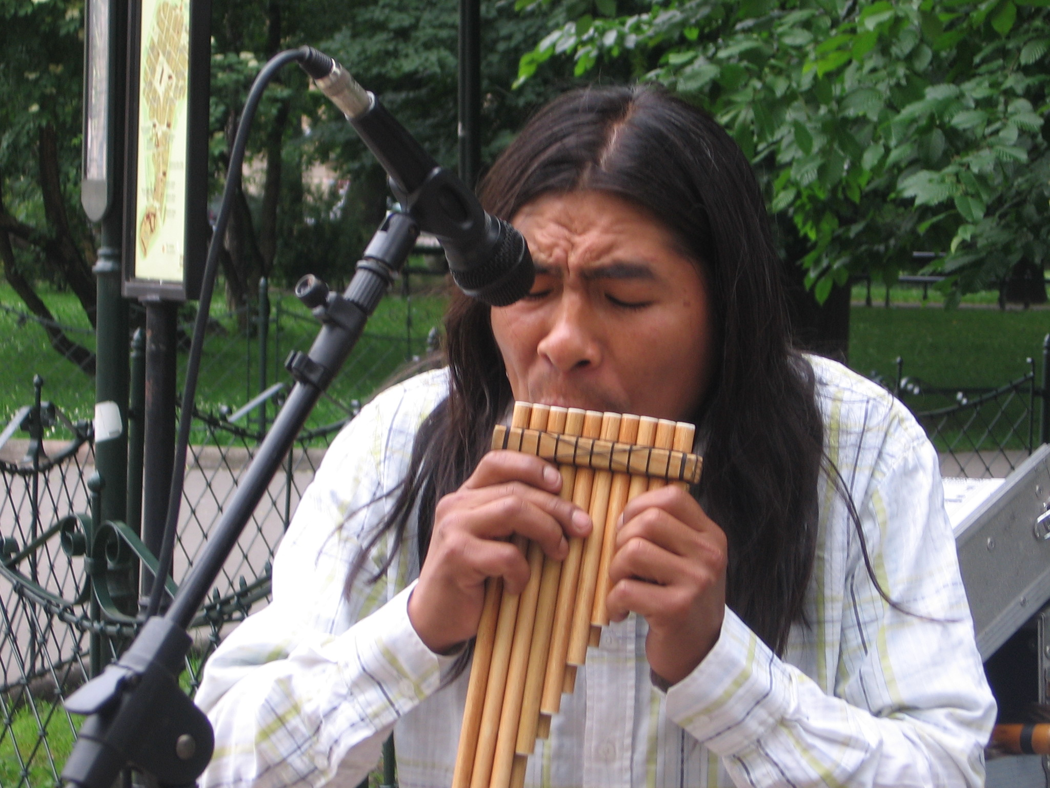 איש מנגן בחליל פאן - 2009